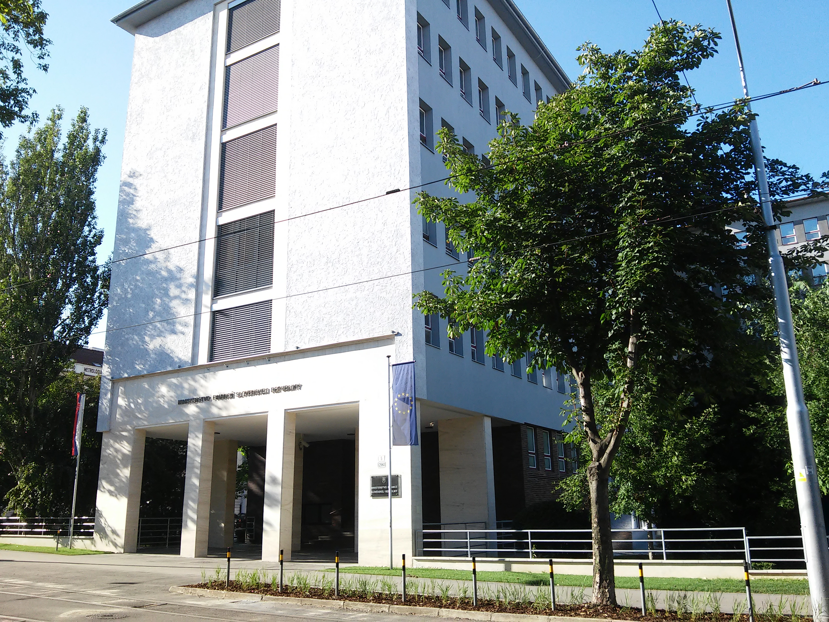 Štefanovičova, Staré Mesto, Bratislava